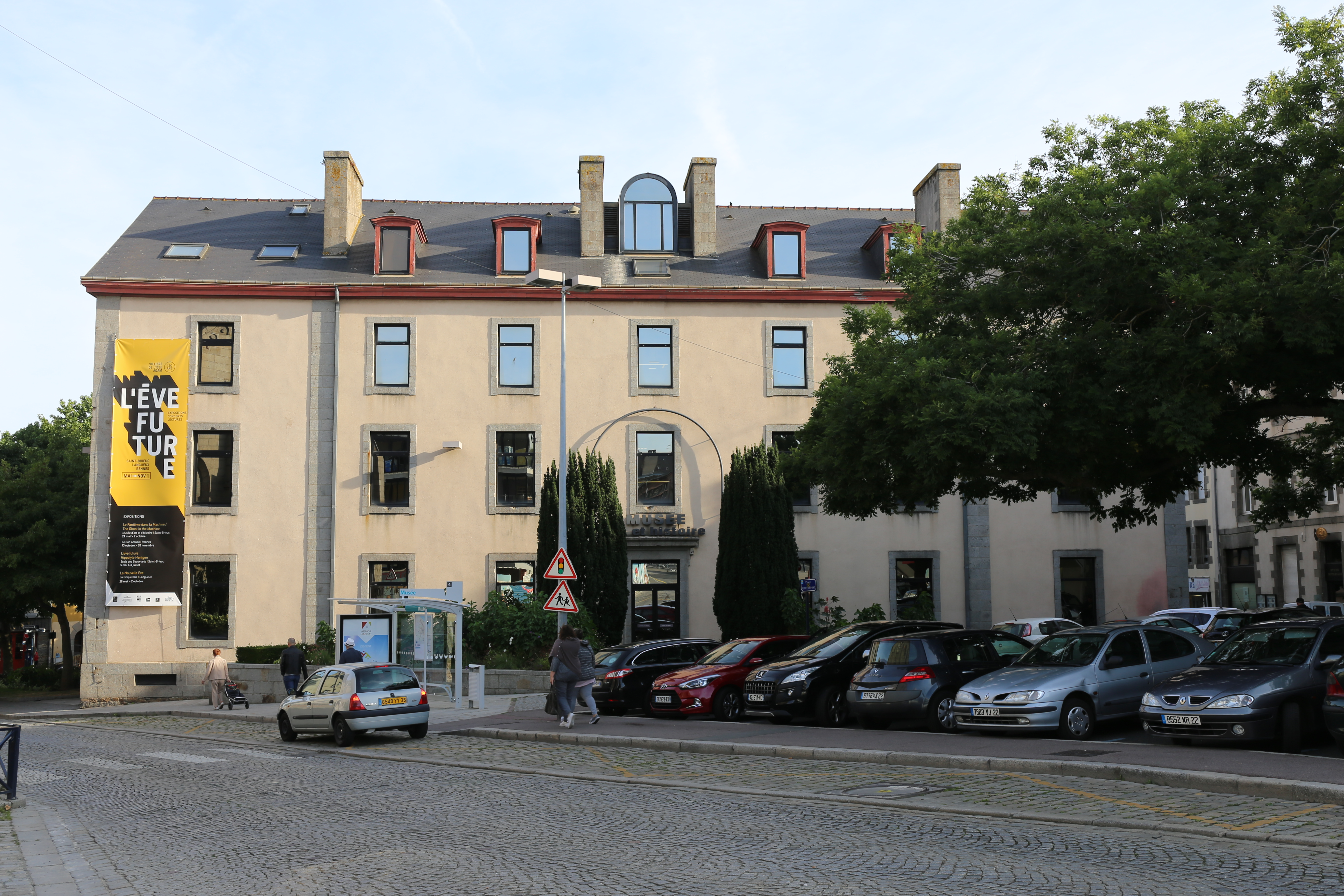 Mirdi arz hag istor Sant-Brieg.